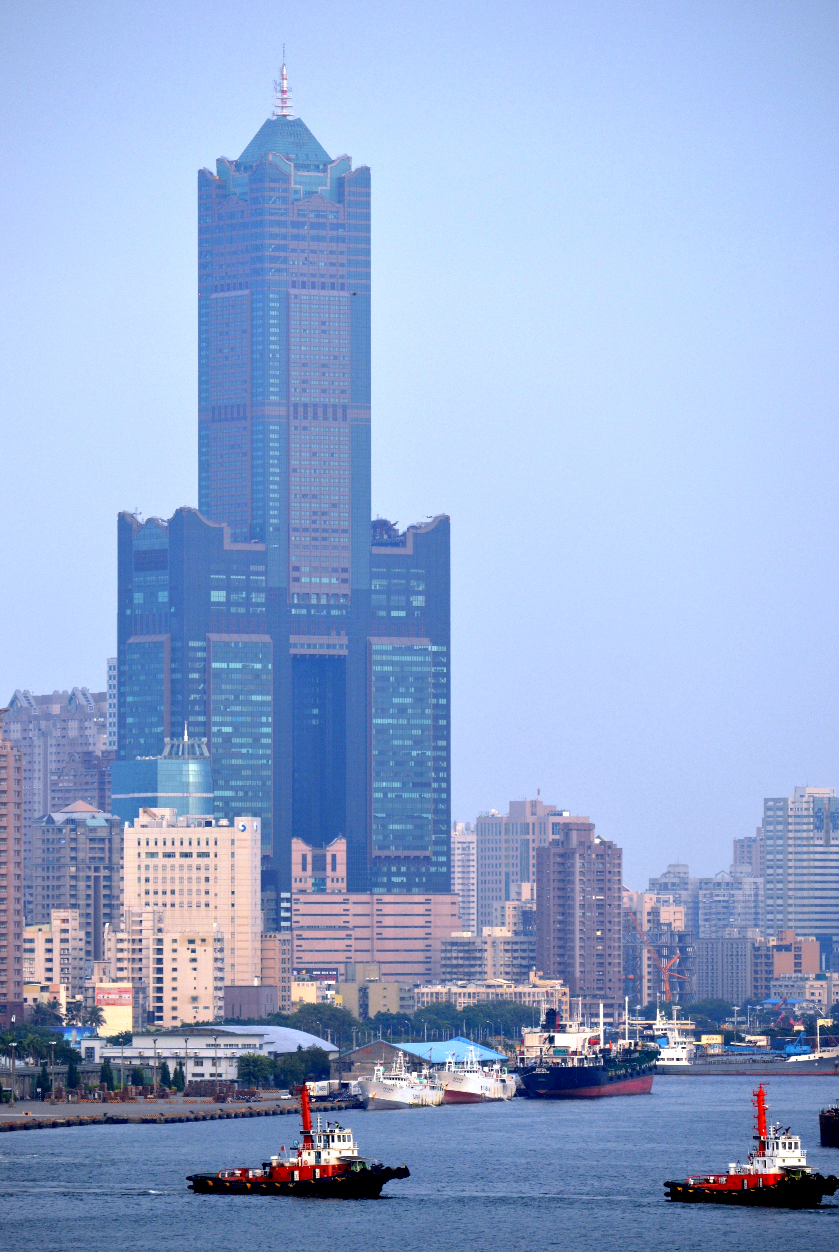 対岸より望む高雄85ビル